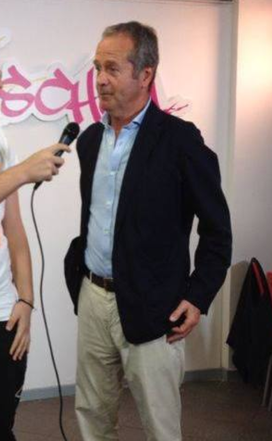 Giuseppe Dossena en 2014